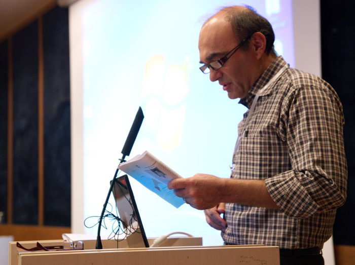 Ahmad Reza Mamduhi, vicprezidanto de la Irana Esperanto-Asocio.